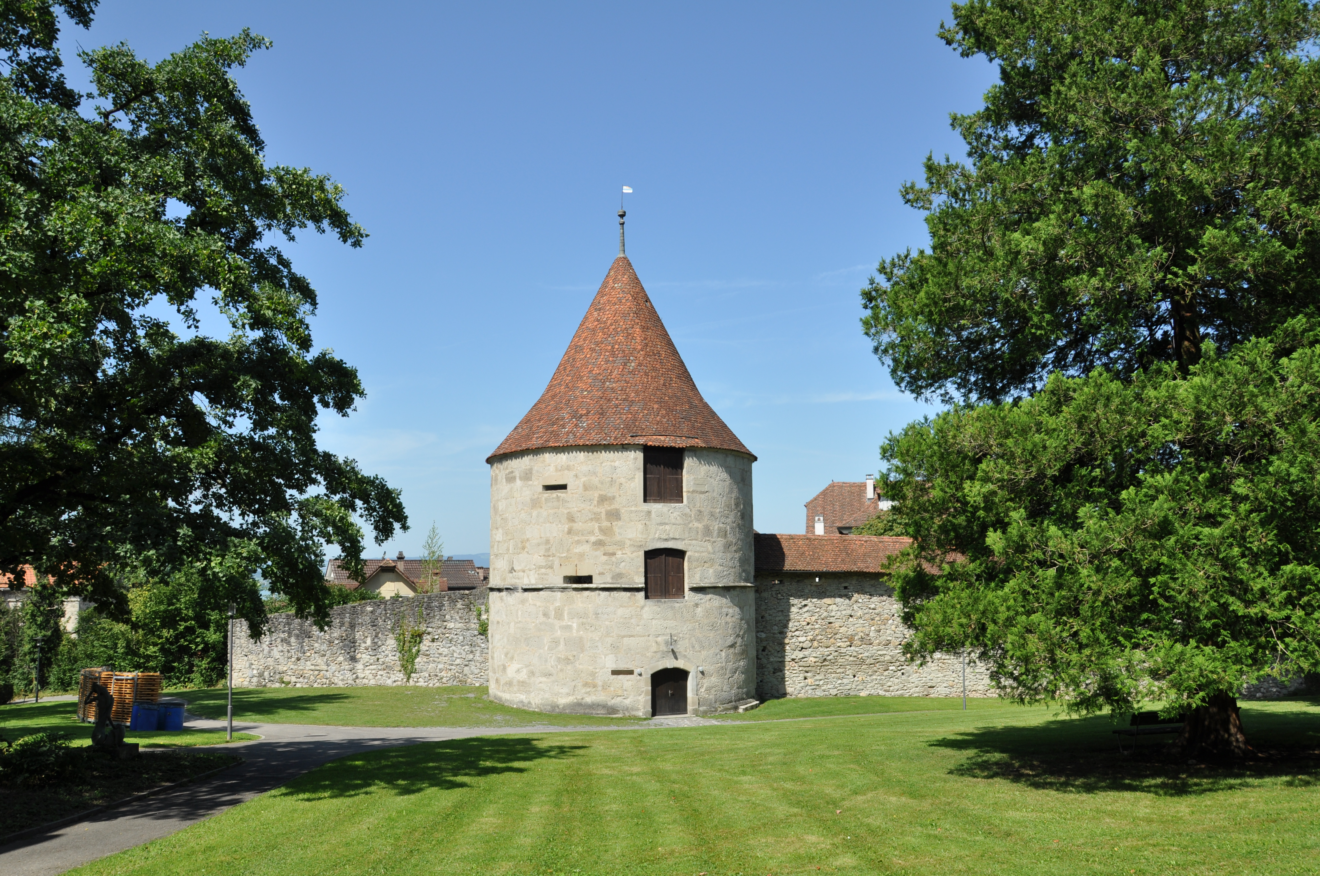 Zug Huwilerturm